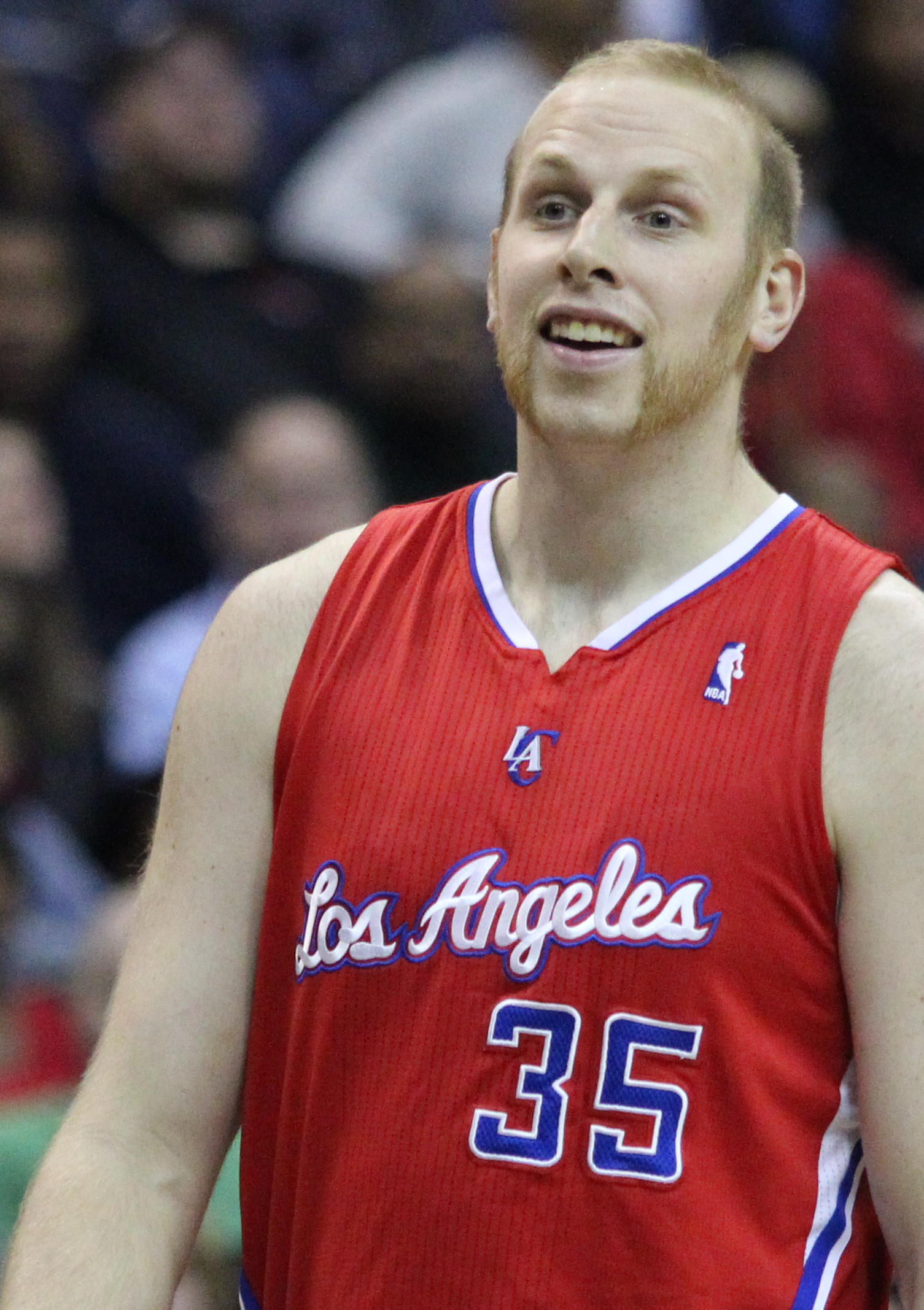 Wizards v/s Clippers 03/12/11